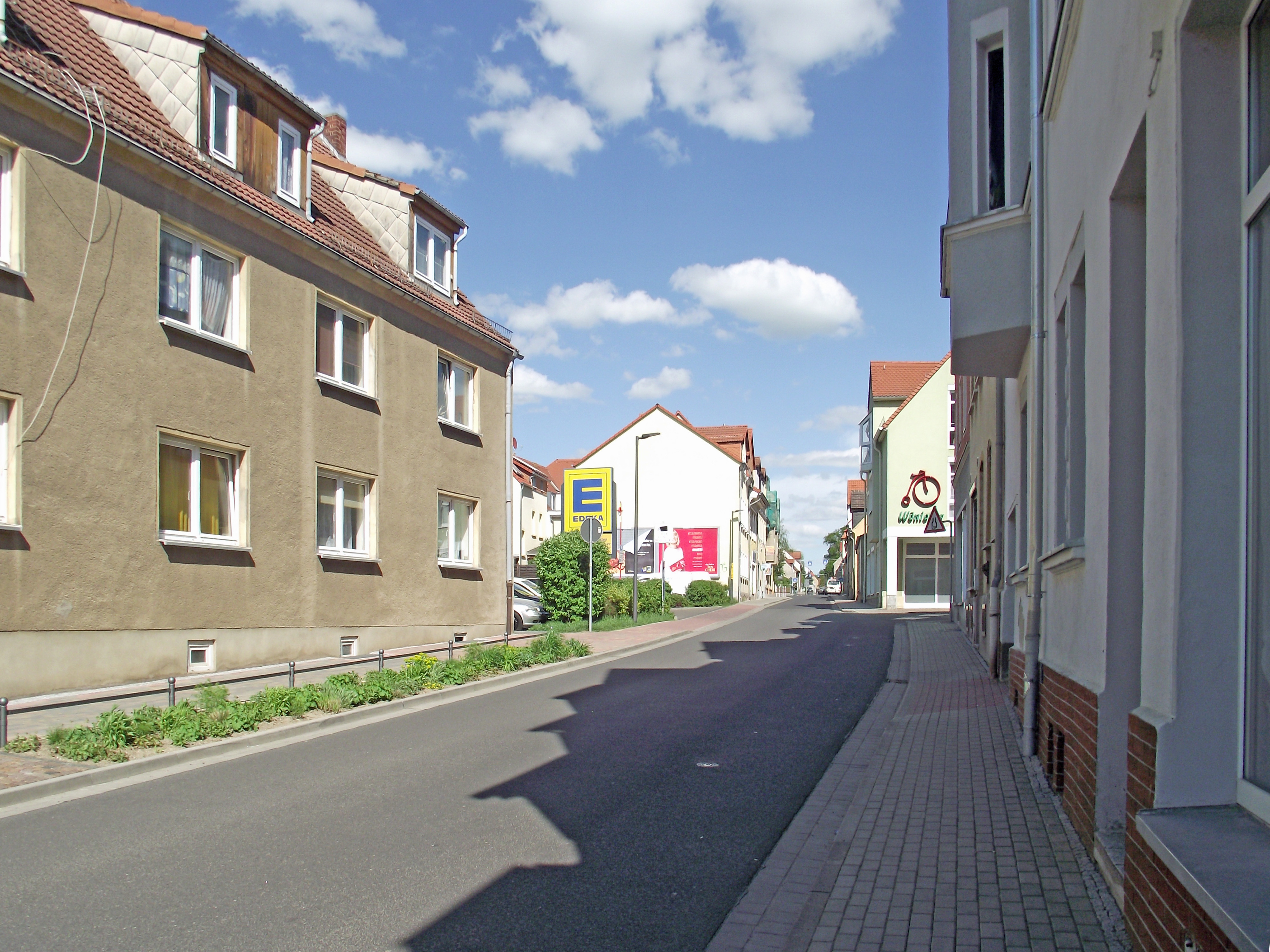 Das Bild zeigt den unteren Abschnitt der August-Bebel-Straße kurz vor ihrem westlichen Ende am Röthaer Marktplatz. Die Blickrichtung fällt den Straßenverlauf hinauf in Richtung Kreuzung EDEKA Karwath/Marienstraße, ca. 900 Meter vor ihrem Ostende an der B95.